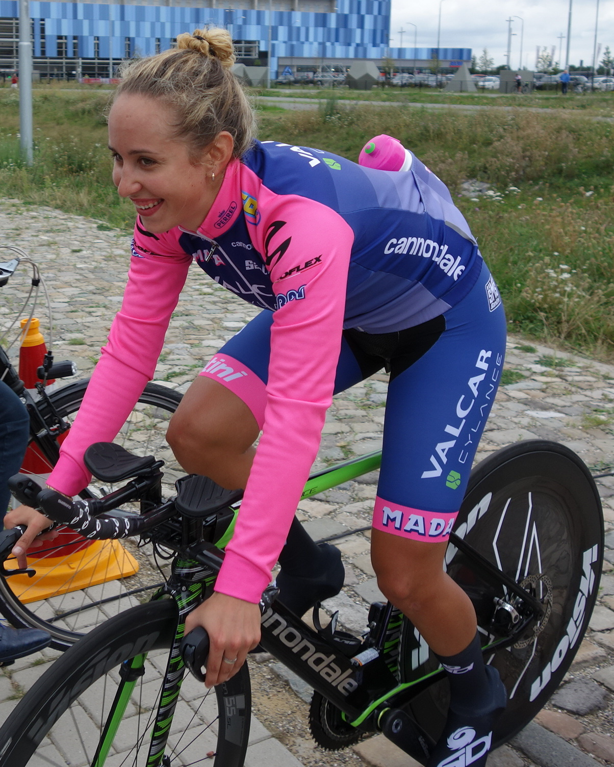 Silvia Persico (Valcar-Cylance) bij de proloog op het Tom Dumoulin Bike Park in Sittard in de Boels Ladies Tour 2019